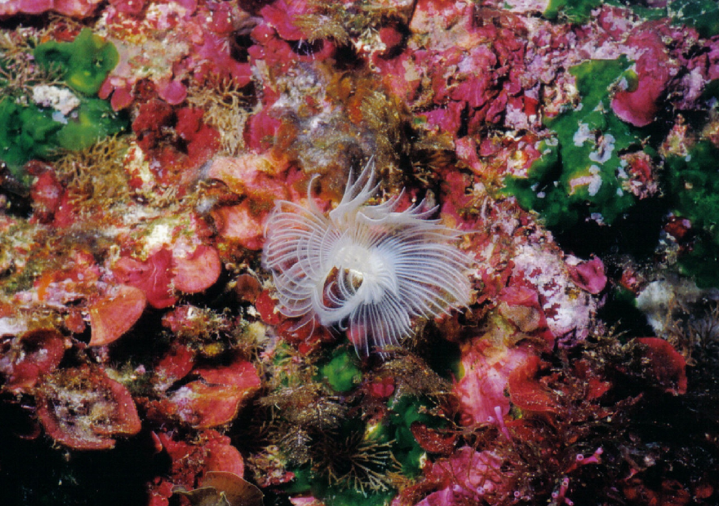 Kalkröhrenwurm